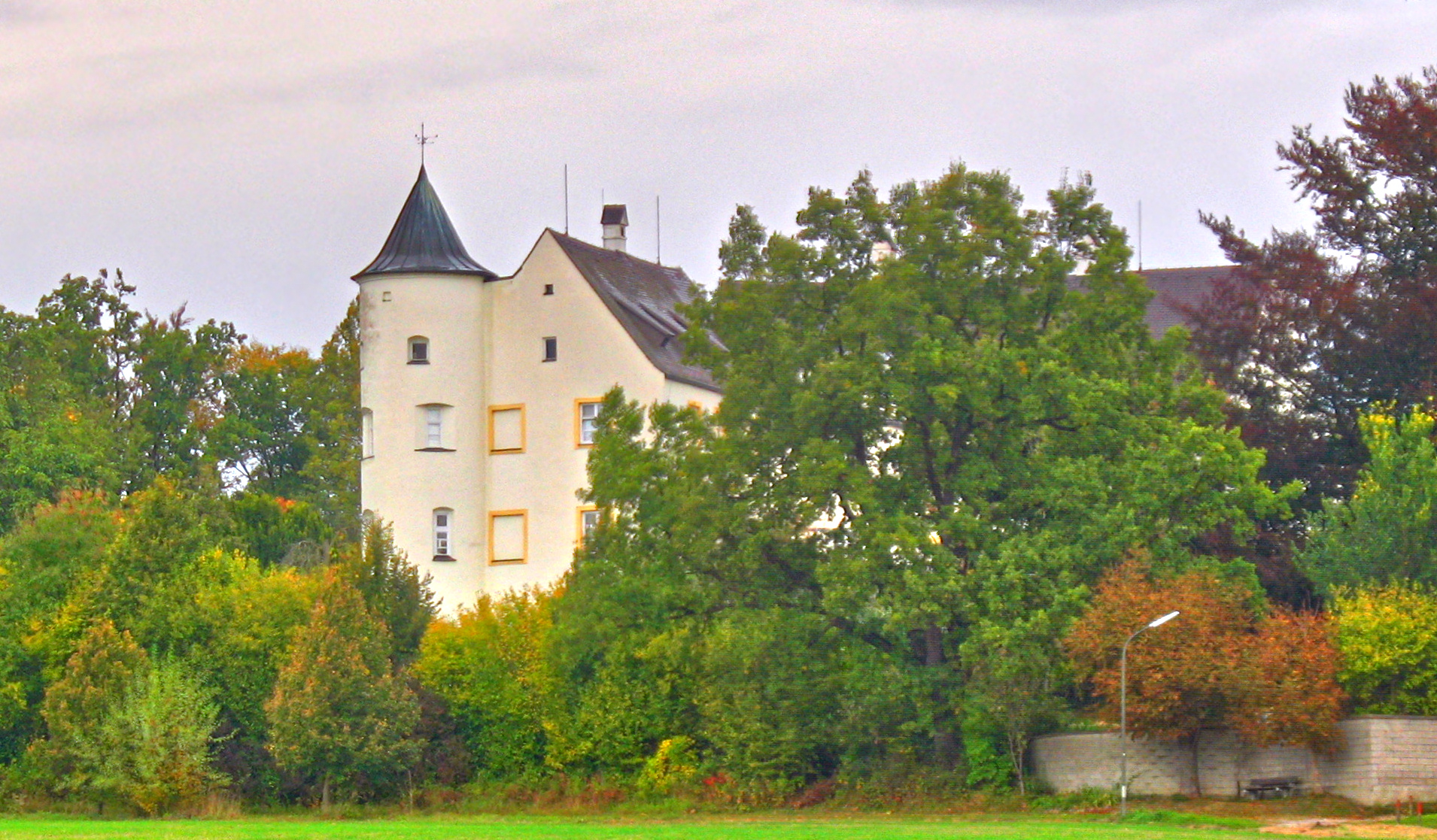 Deutschland, Bayern, Landkreis Dachau, Gemeinde Bergkirchen, Schloss Lauterbach